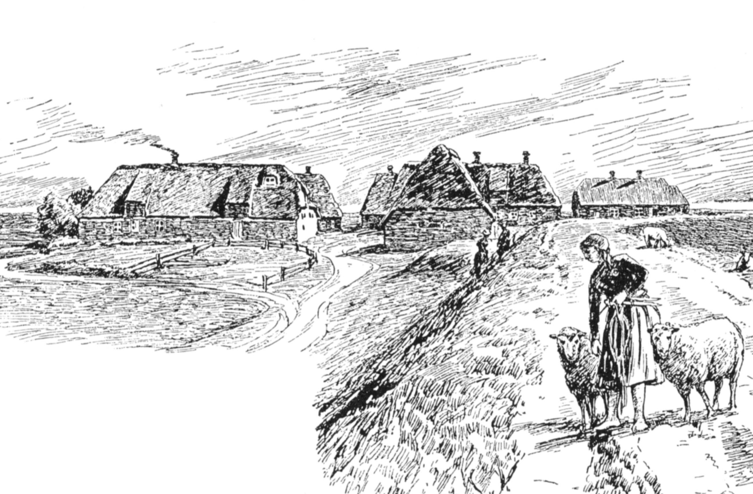 Deezbüll um 1895, Zeichnung von Fritz Stoltenberg.